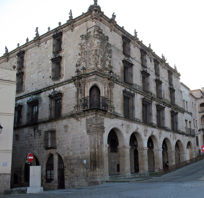 Palacio de la Conquista en la ciudad de Trujillo (Cáceres, España)